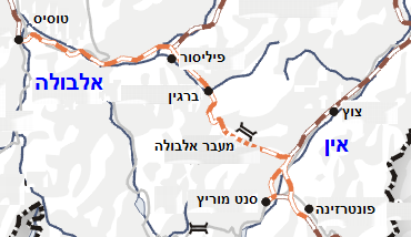 Darstellung zeigt Lage und Verlauf der Albulabahns. Zeichnung erstellt 2004 von Benutzer:Sansculotte. Bild ist unter der GNU FDL zur weiteren Verwendung freigegeben. Quellenangabe und Beleg an erbeten.